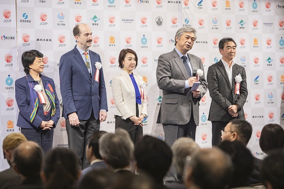 第1回日本オープンイノベーション大賞授賞式選考委員（2019年3月5日）